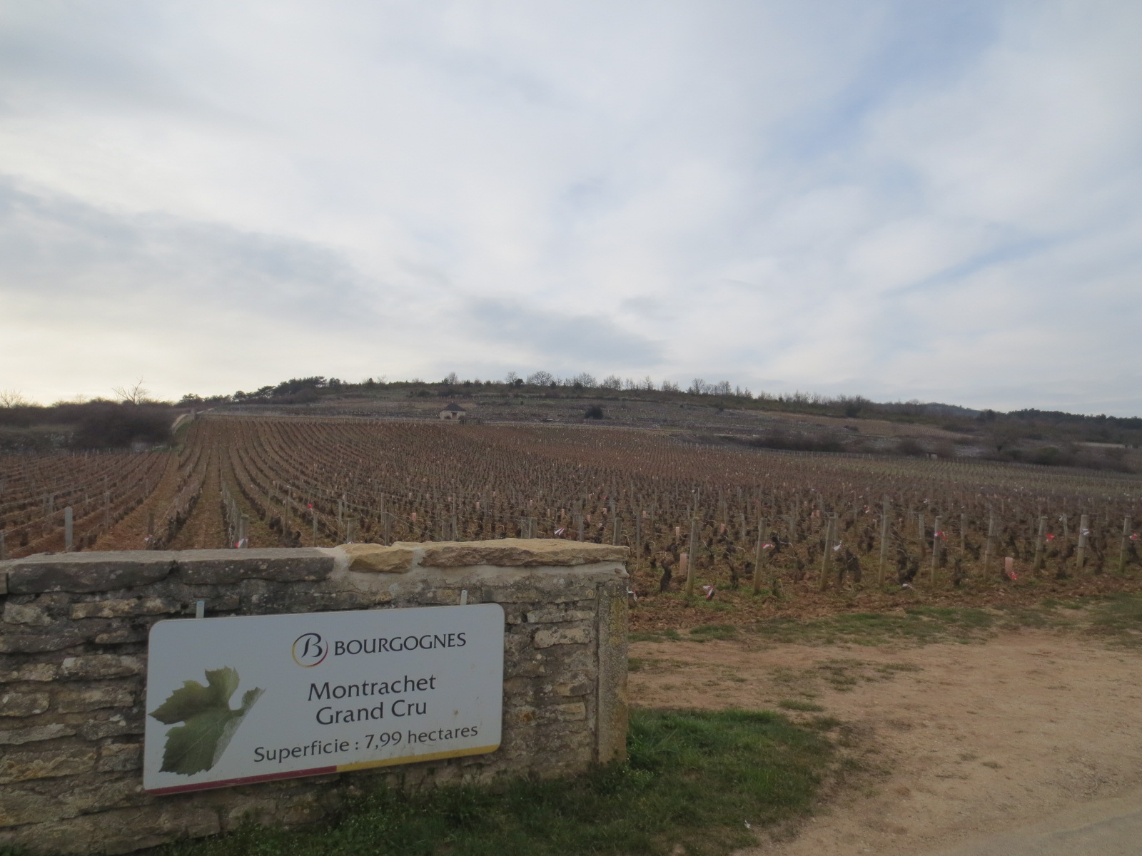 Vignoble Montrachet